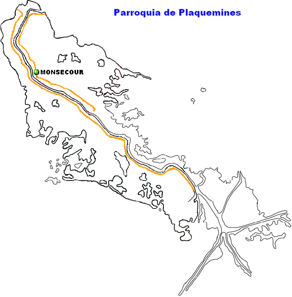 Monsecour, Louisiana